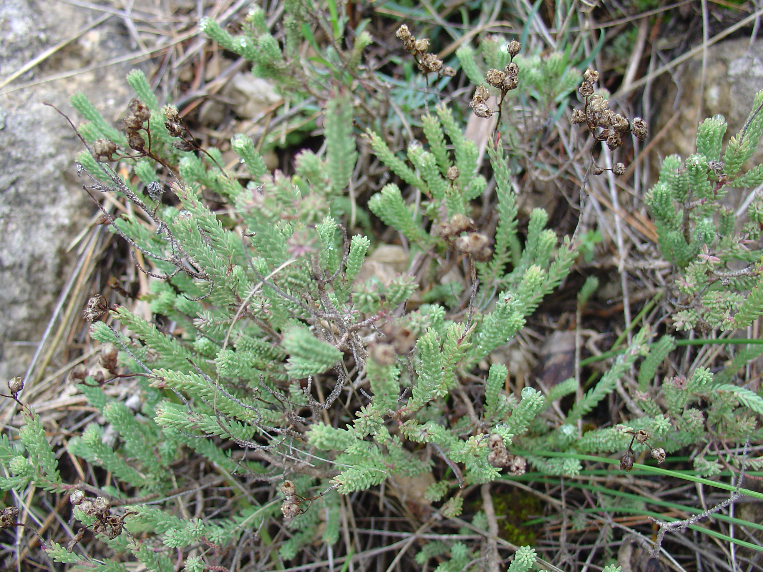 Hypericum ericoides (fruto) from Sª Espuña, Murcia, Spain